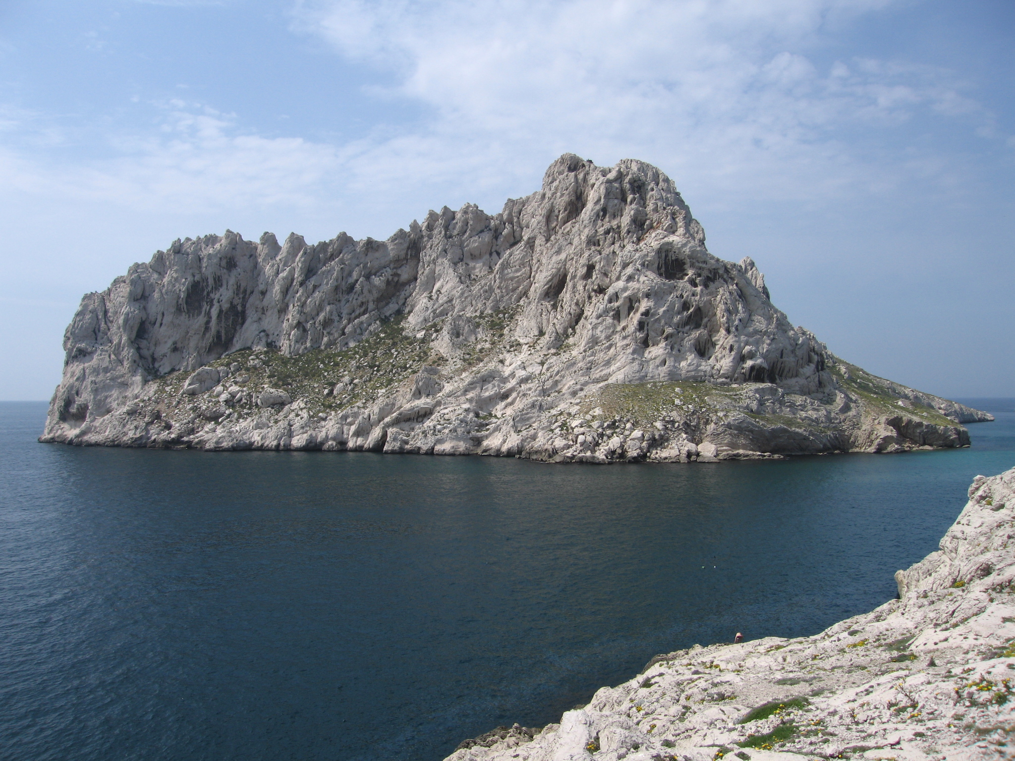 Ile Maïre